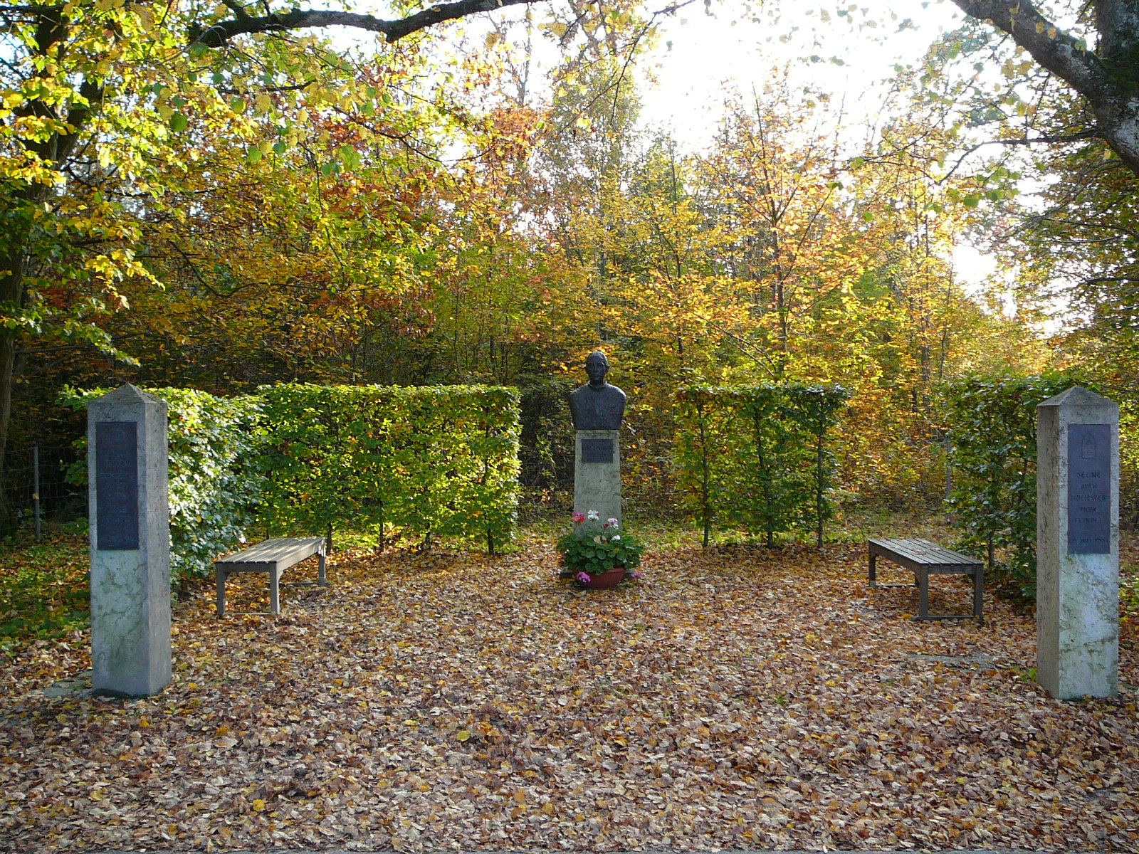 Gedenkstätte für Karl Leisner beim Waldsanatorium Planegg